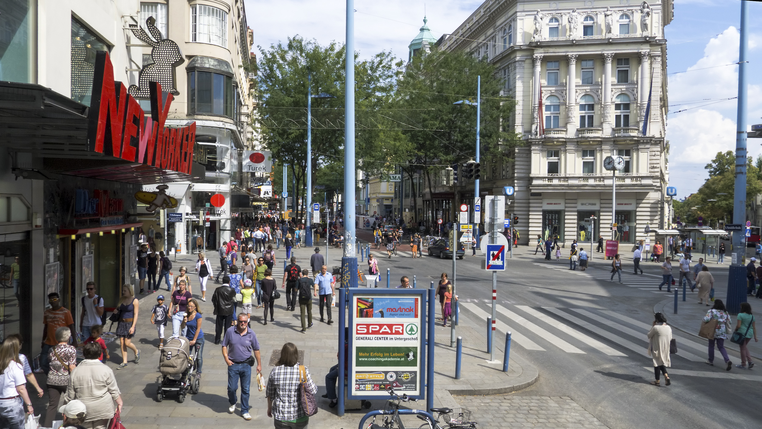 Aufnahme nicht mehr aktuell: Shopping in der Mariahilfer Straße bei Nr. 70 in Wien 7